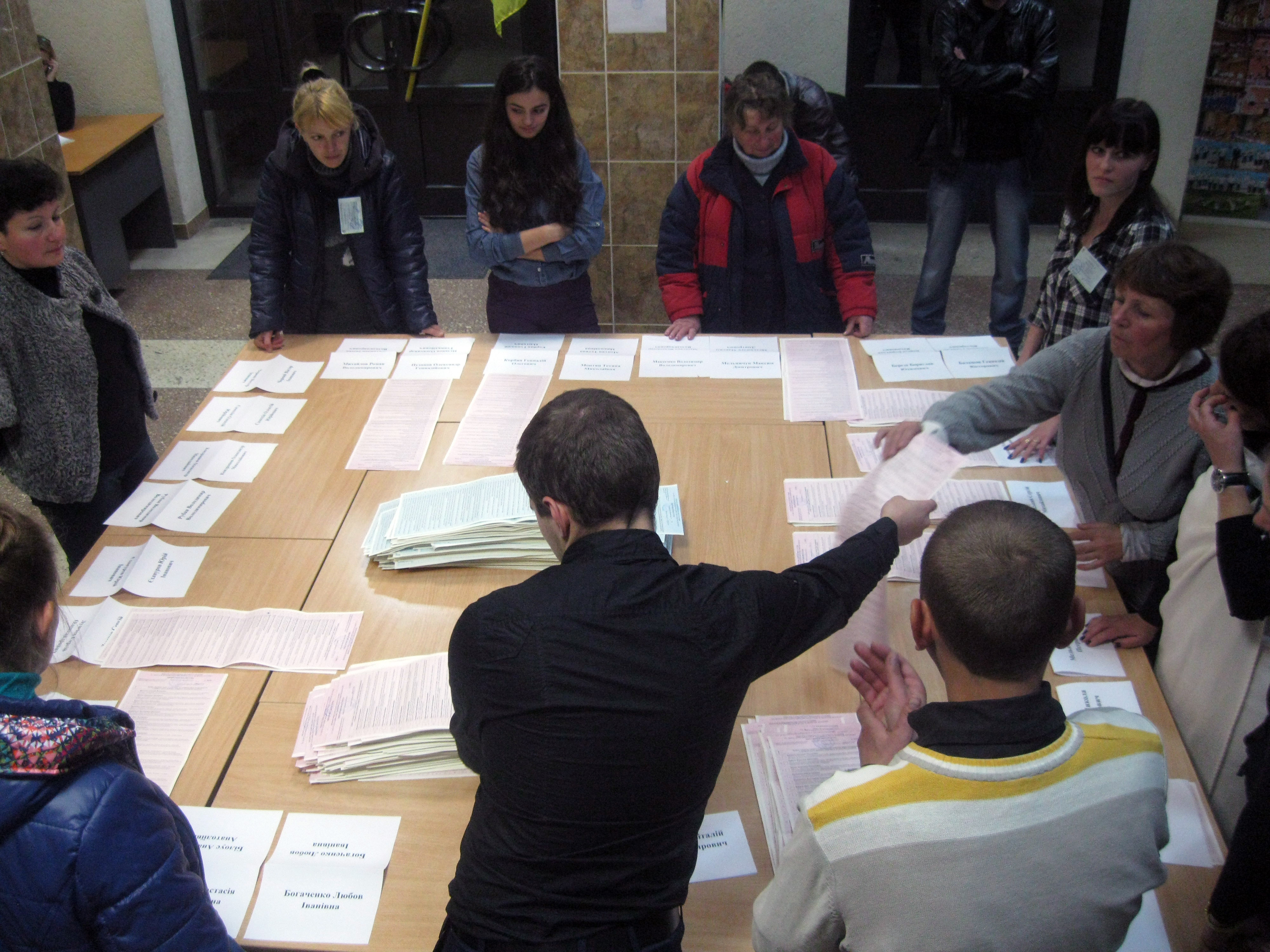 Процес підрахунку голосів, процес розподілу бюлетенів за кандидатами у міські голови, та списками партій до міської ради. Одна з ДВК у Солом'янському районі Києва.